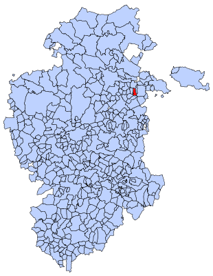 Cubo de Bureba